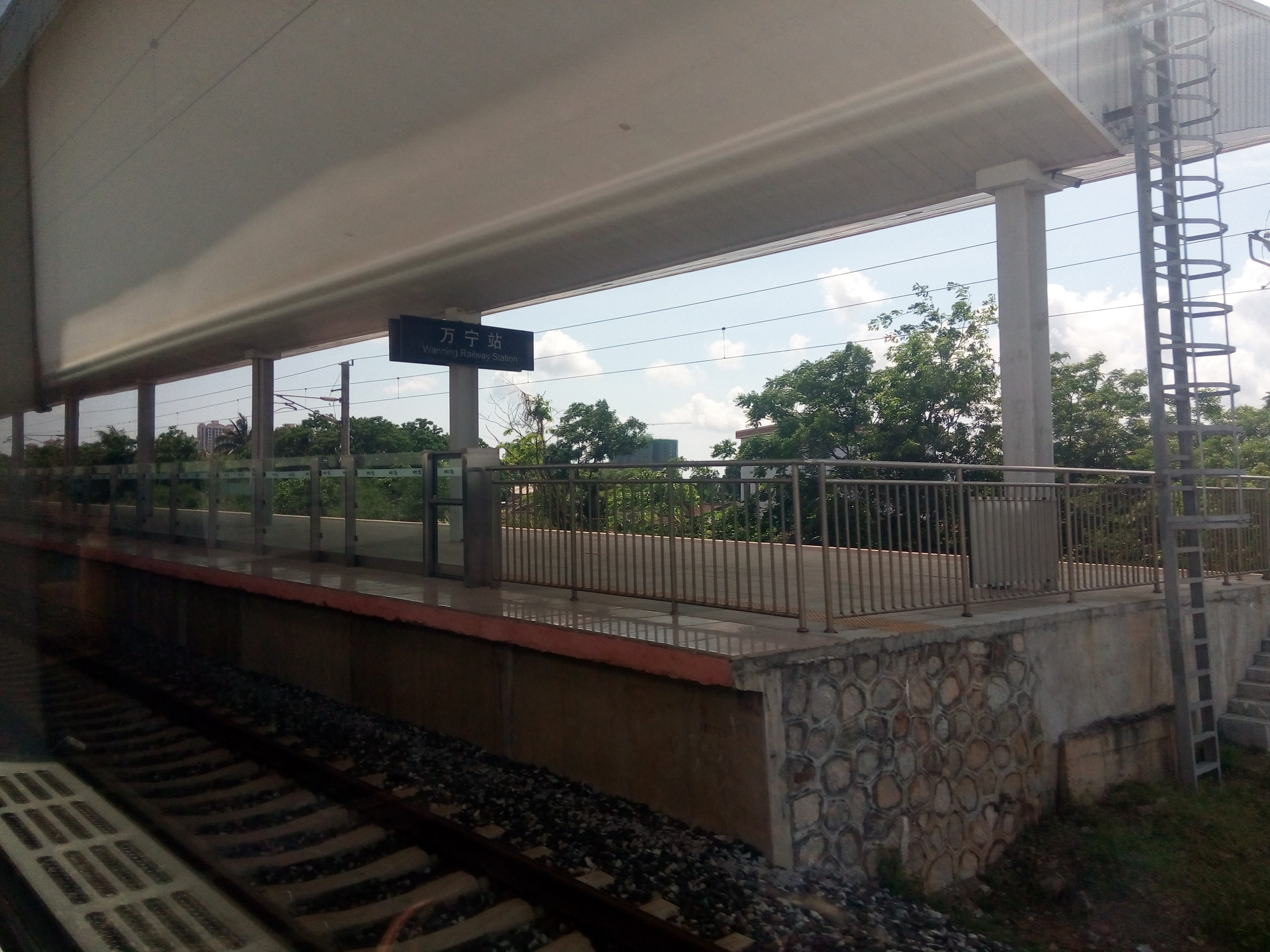 万宁站。。